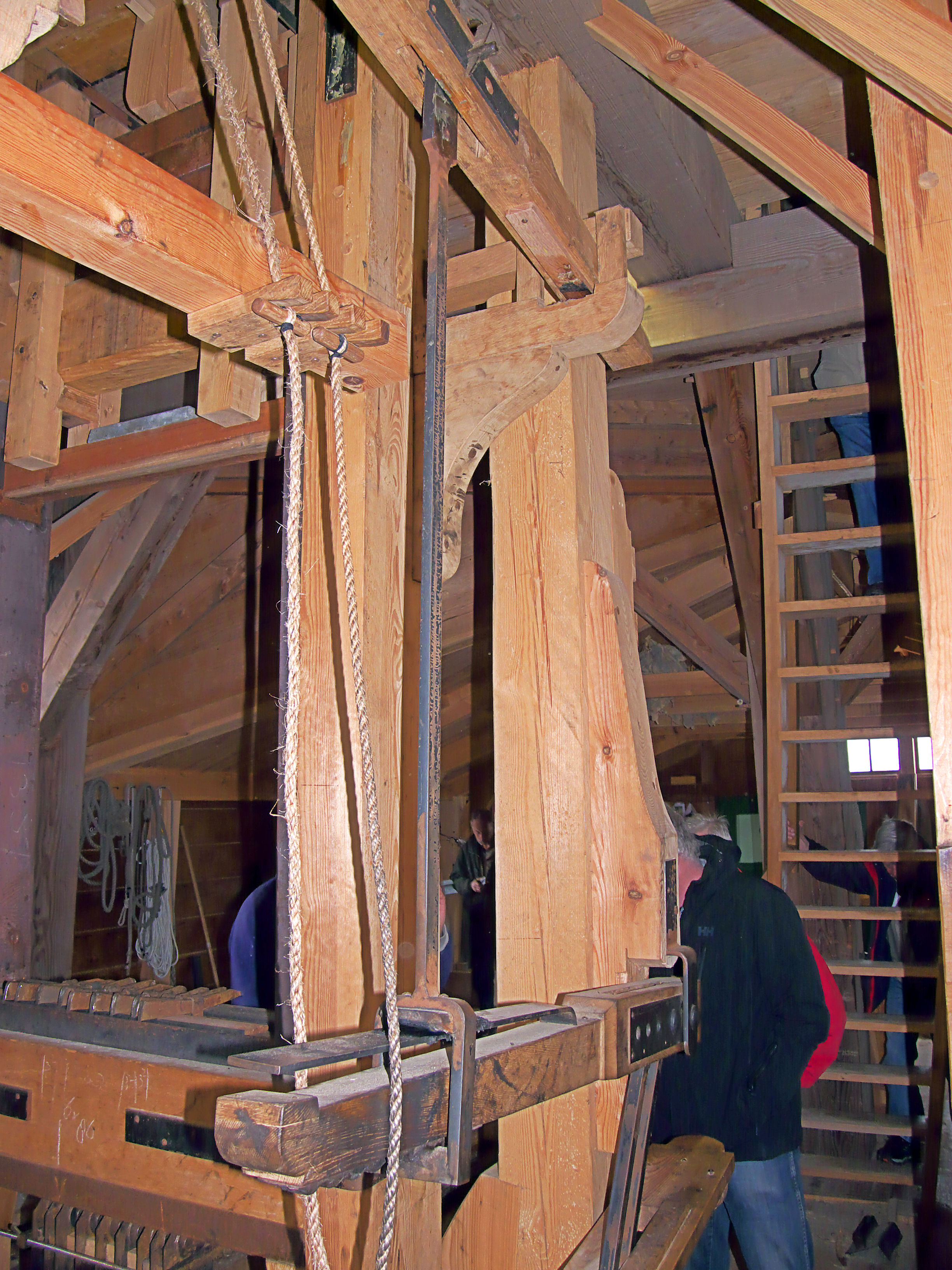 Molen Het Jonge Schaap, krabbelstok en krabbelboom